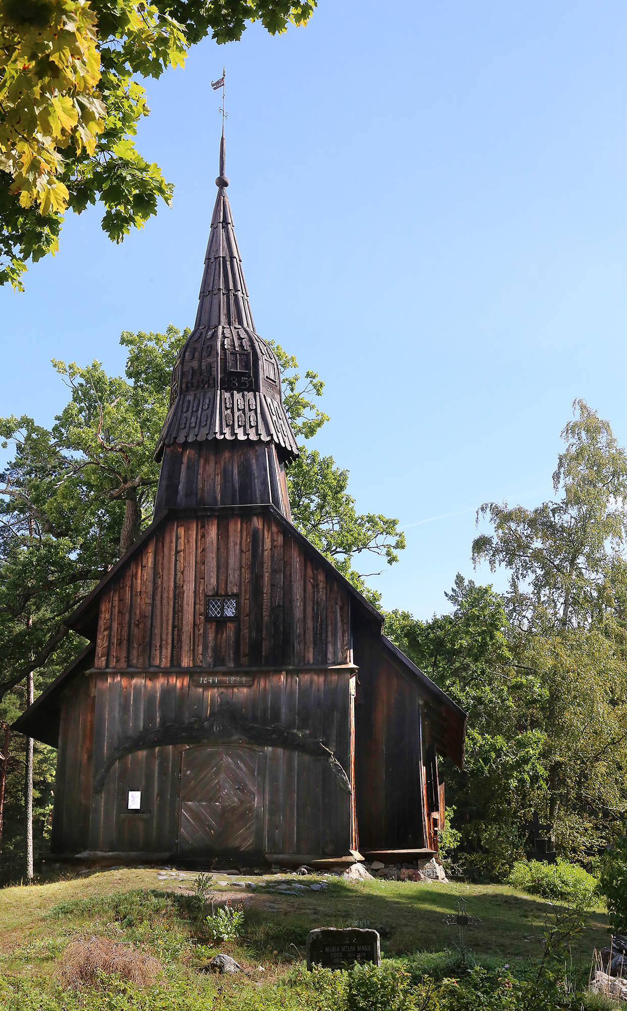 Ruhnu Püha Magdaleena kirik, Ruhnu puukirik 16